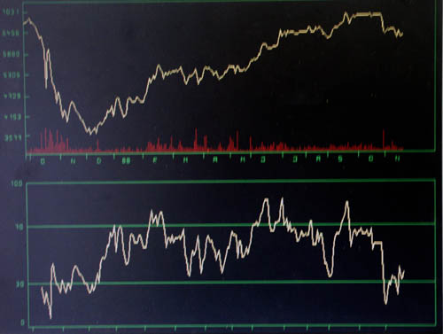 zelfgemaakte foto uit zelfgeschreven beursprogramma